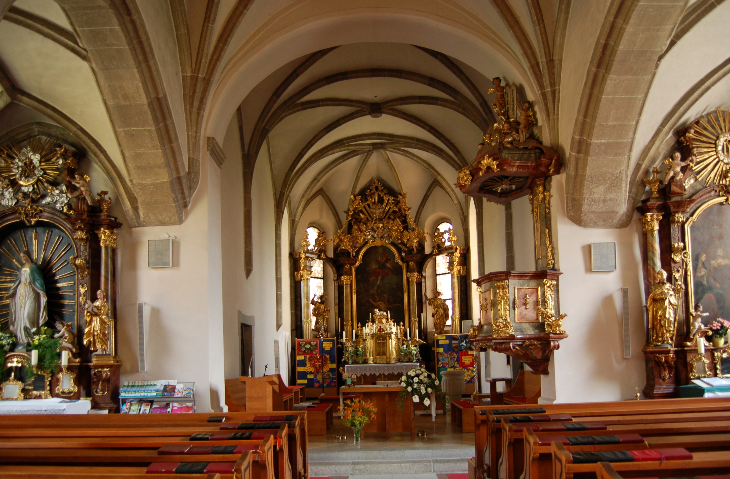 Die Pfarrkirche von Feldkirchen ist ein gotischer Kirchenbau mit einheitlicher Rokokoeinrichtung und freistehendem ehemaligen Wehrturm.